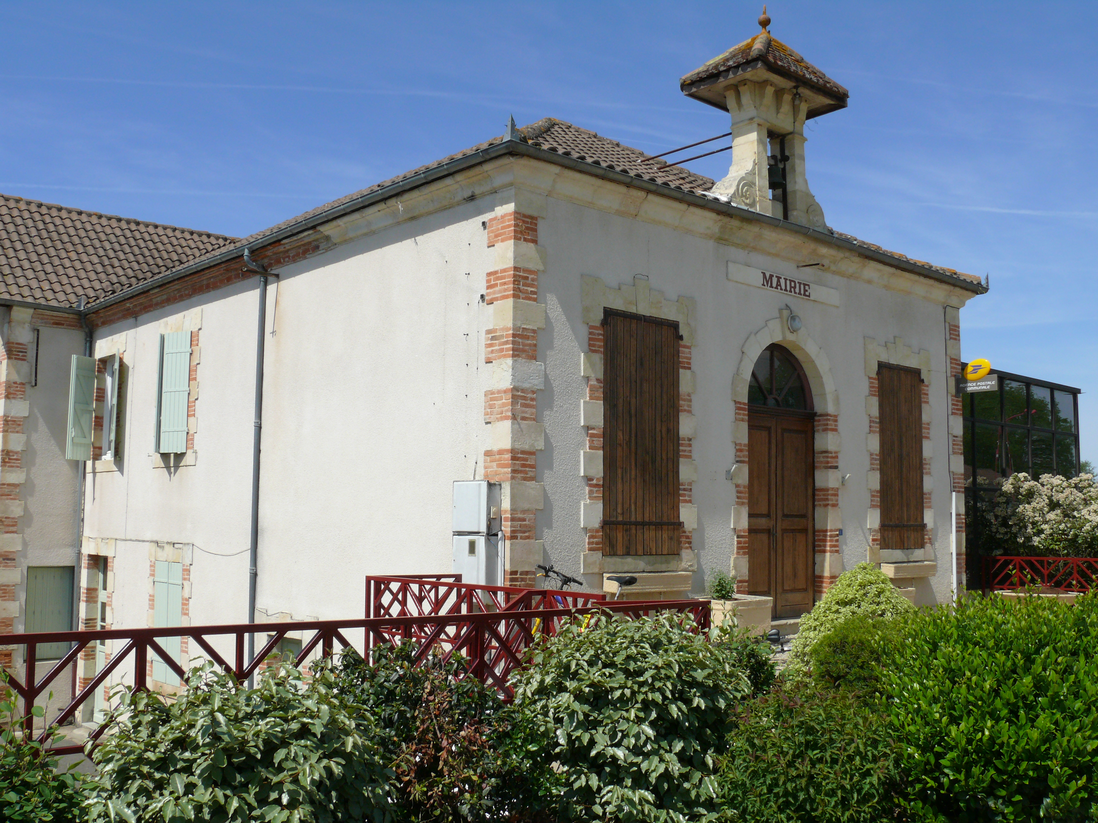 Momuy - Mairie